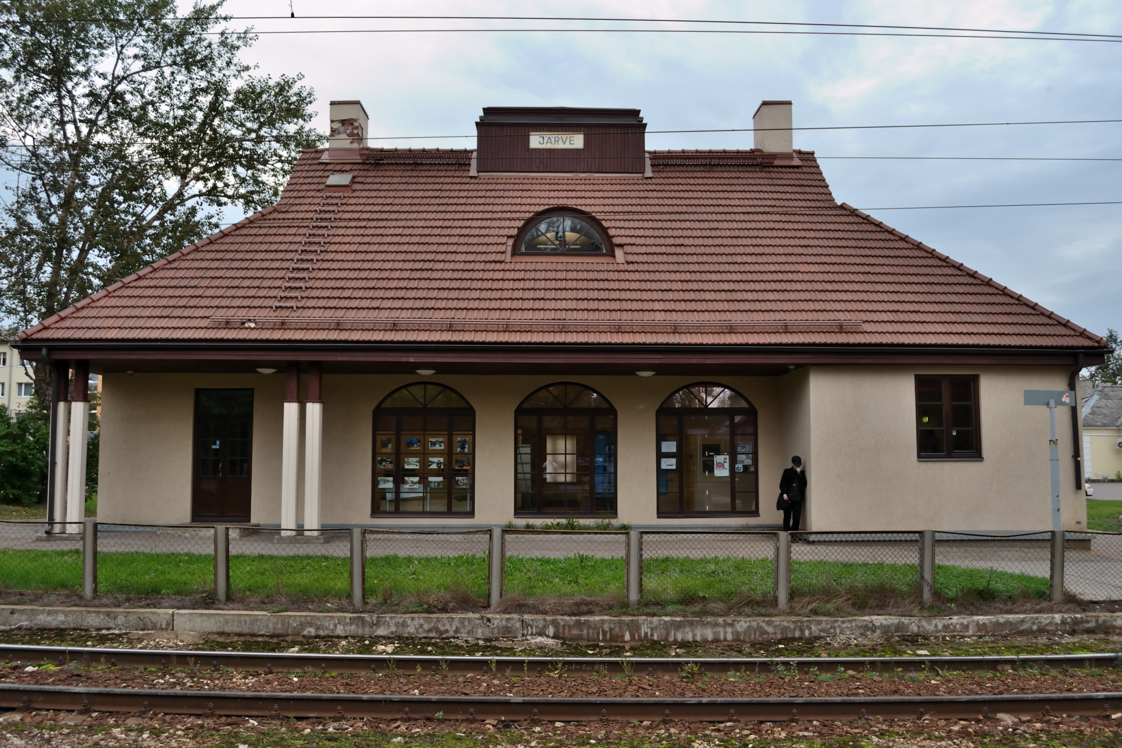 Järve laiarööpmelise raudtee jaamahoone, 1926